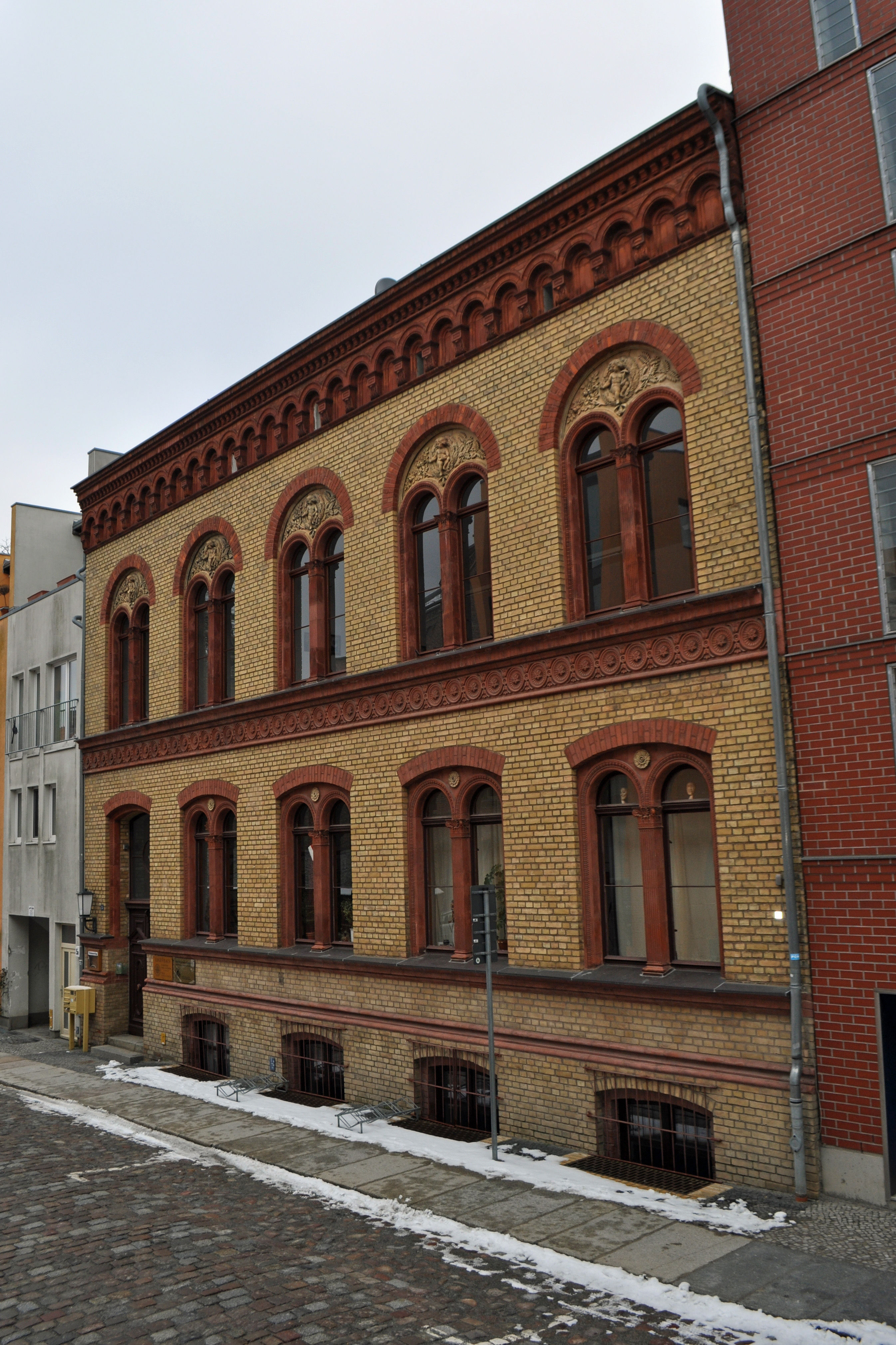 Stralsund, Bielkenhagen 5 (2013-02-13), by Klugschnacker in Wikipedia This is a photograph of an architectural monument.